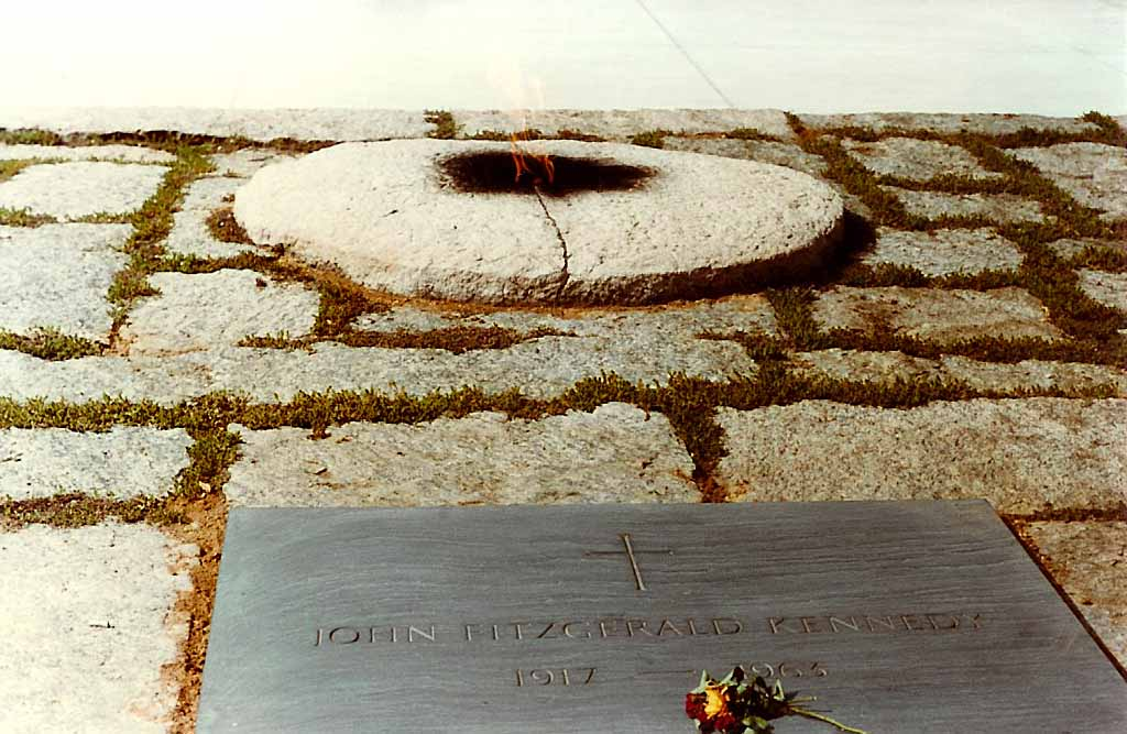 Arlingtong Kierfecht1.